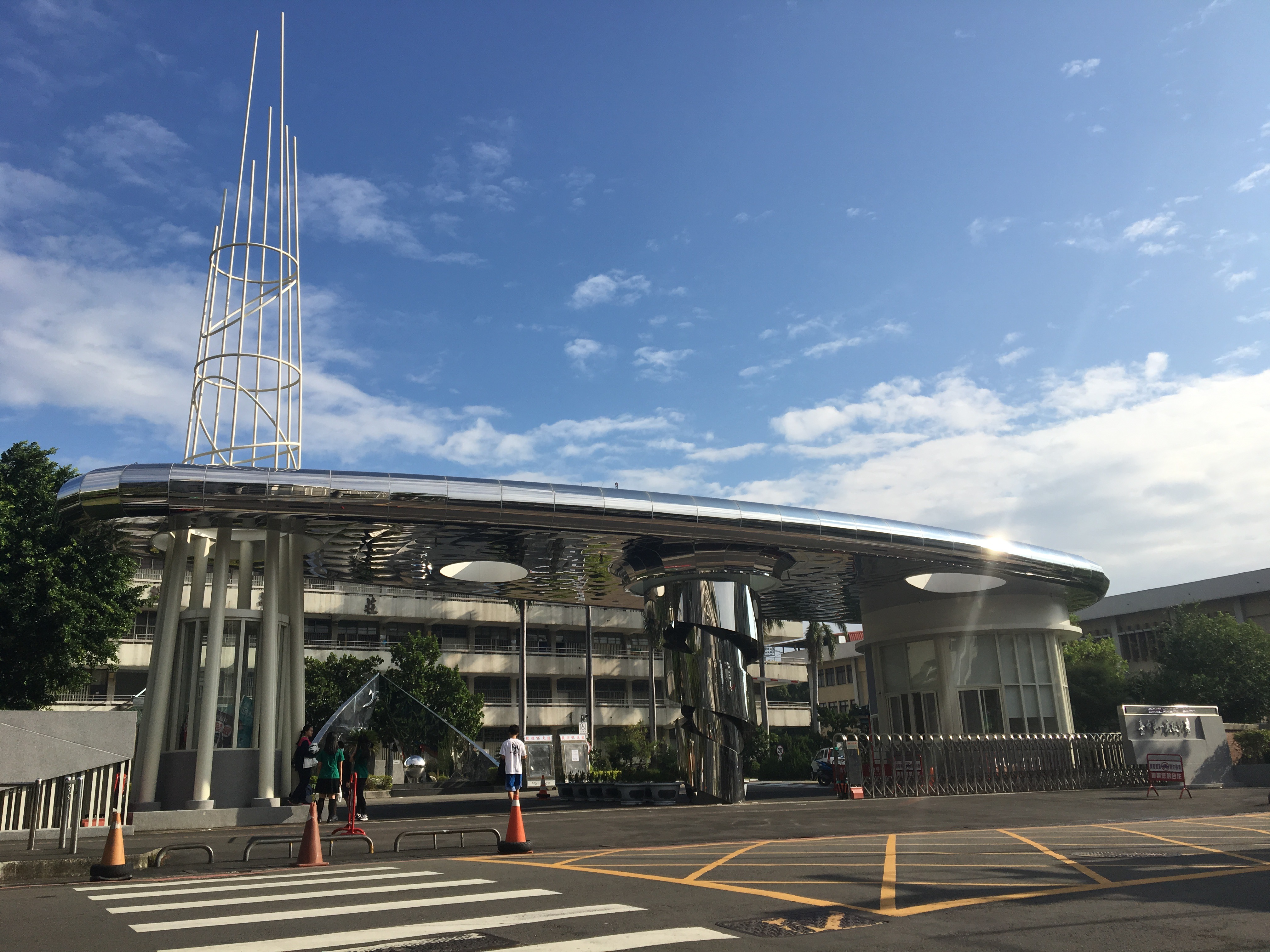 臺中第一高級中學第四代校門。